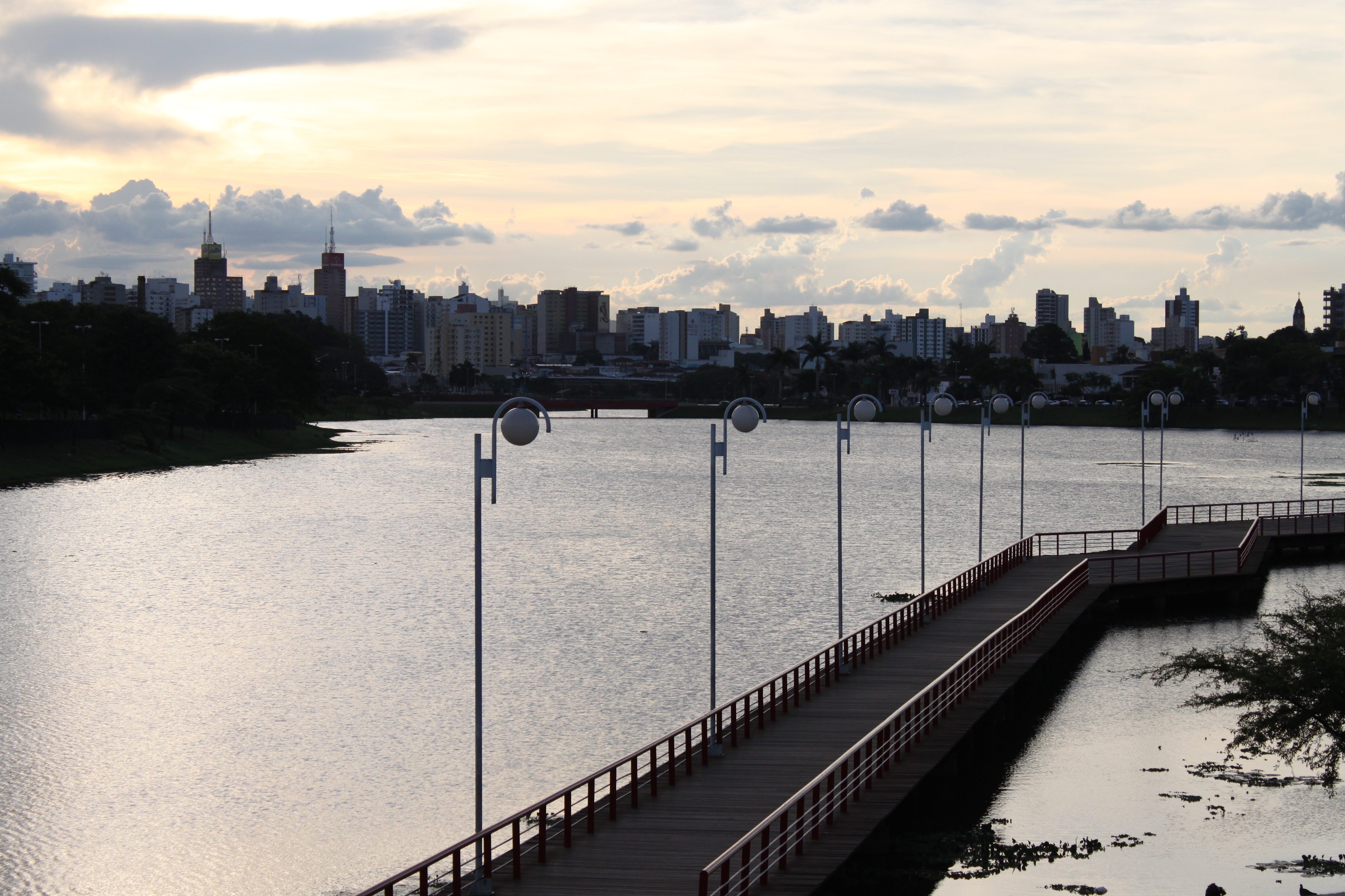 Ponte do Parque da Represa de São José do Rio Preto